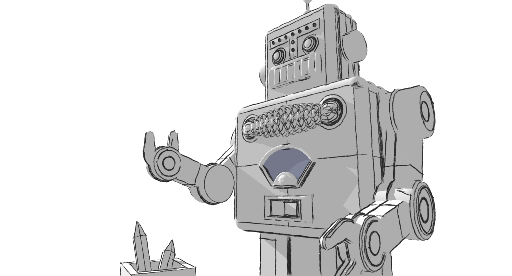 スケッチエッジで表現したレンダリングした画像